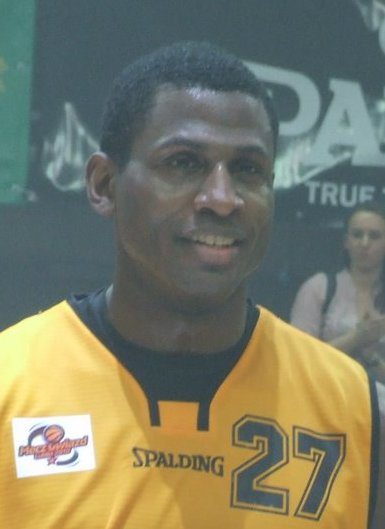 Michael Wright podczas Meczu Gwiazd PLK 2010